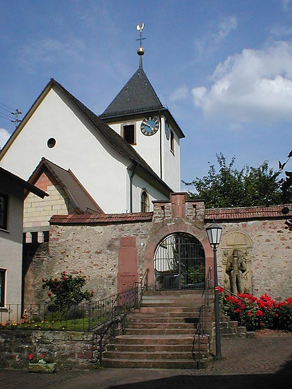 Katholische Kirche in Neckargerach-Guttenbach